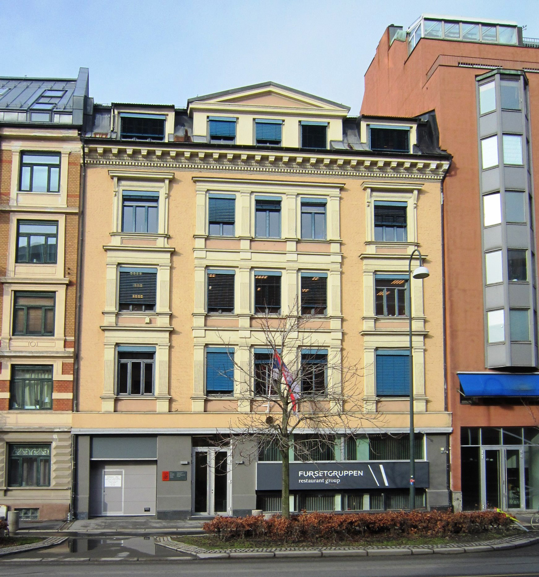 Munkedamsveien 59B med Serbias ambassade i Oslo